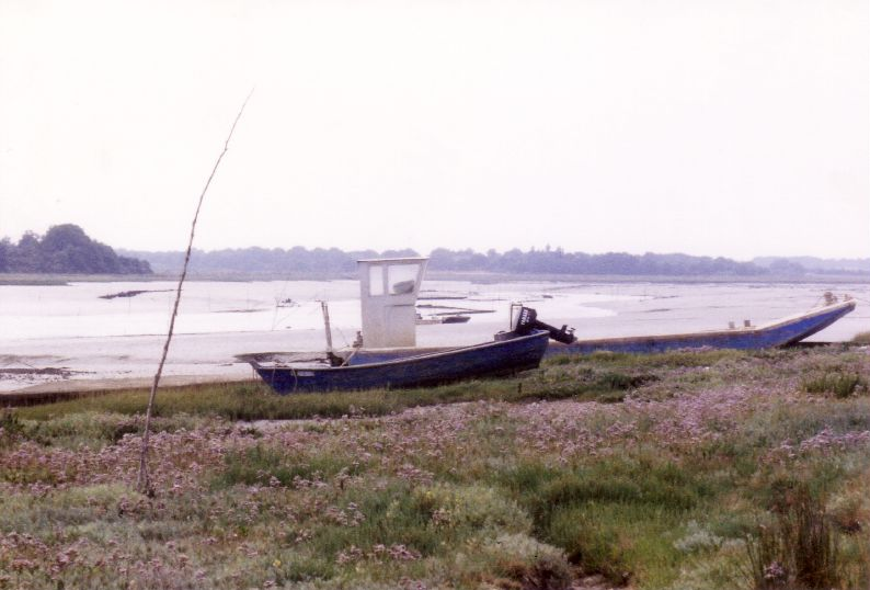 Les embarcations de pêcheur du golfe du Morbihan - photo personnelle prise en 1993